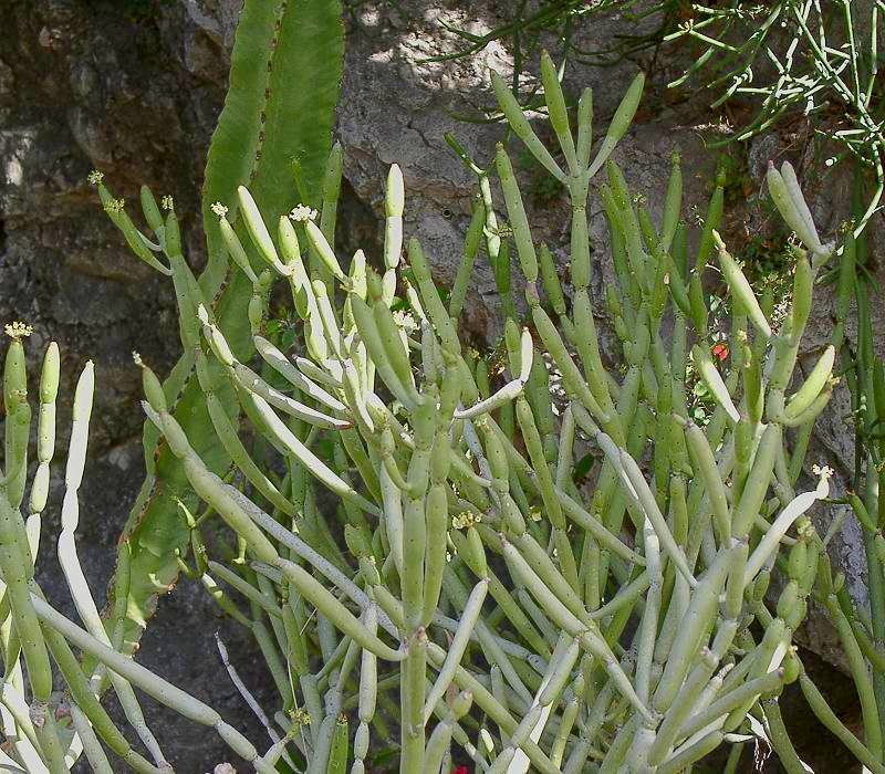 Euphorbia alluaudii ssp. oncoclada Jardin Exotique, Monaco